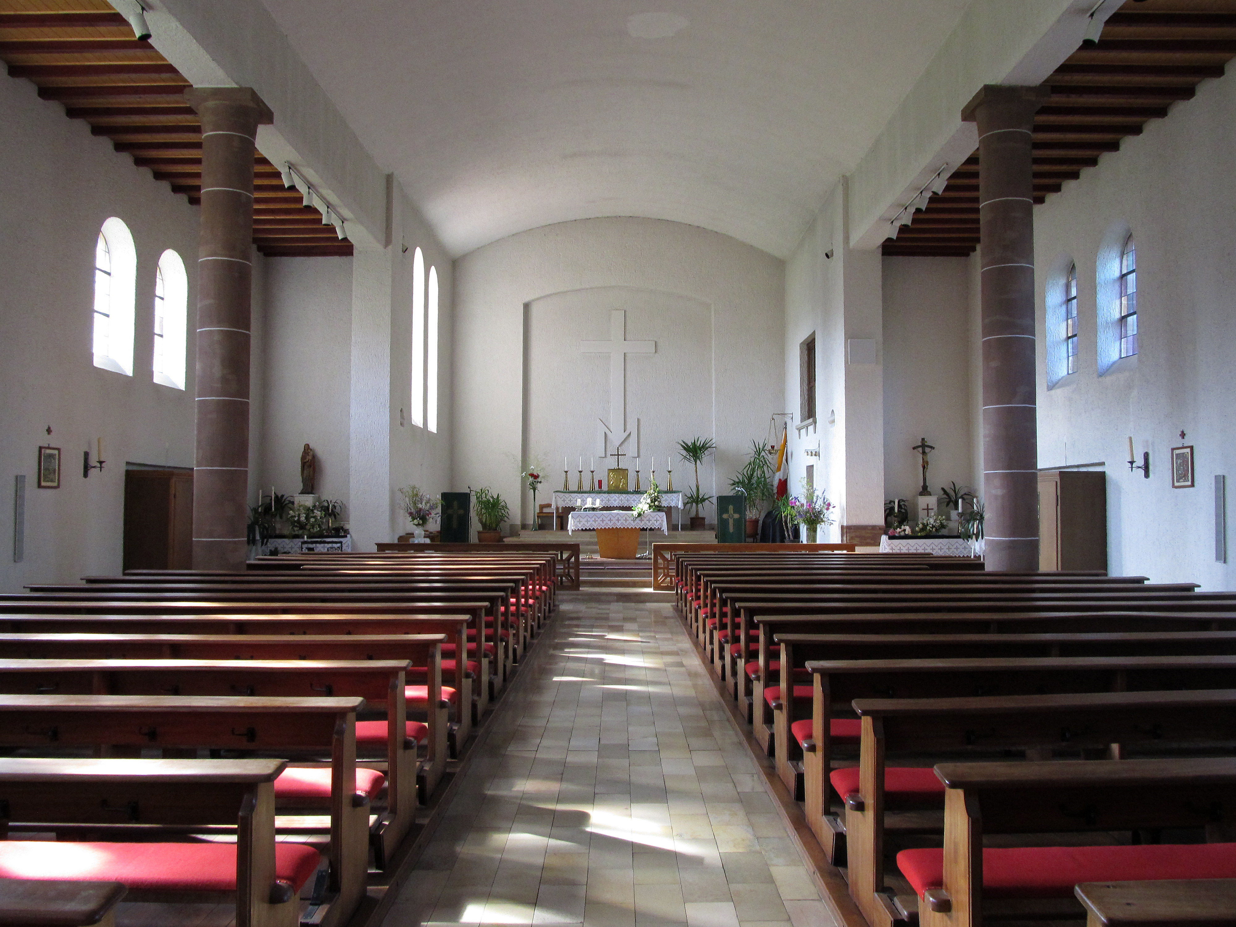 Blick ins Innere der katholischen Pfarrkirche Maria Königin der Engel in Stanbach, Gemeinde Contwig, Rheinland-Pfalz